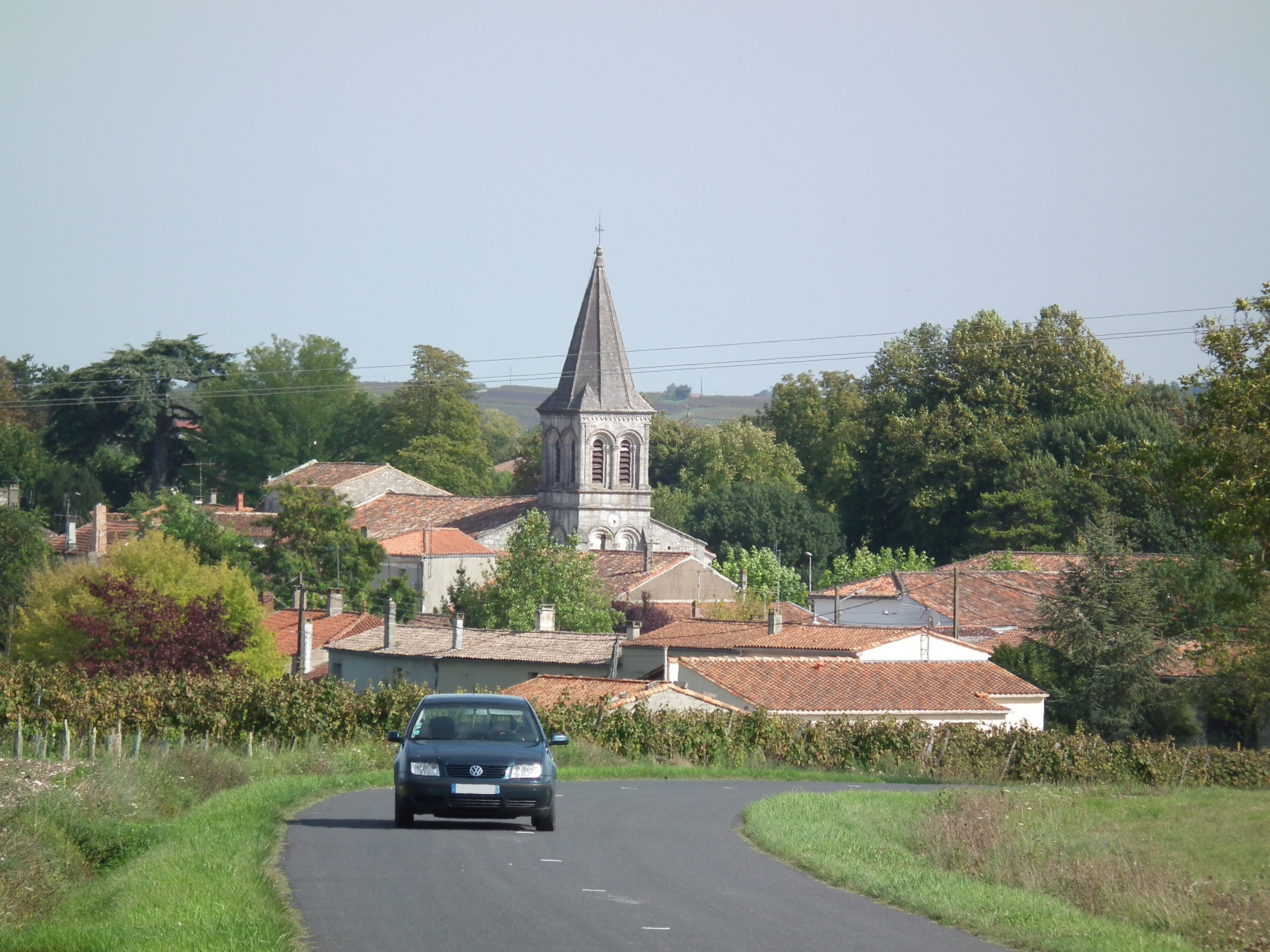 Le village de Jarnac-Champagne